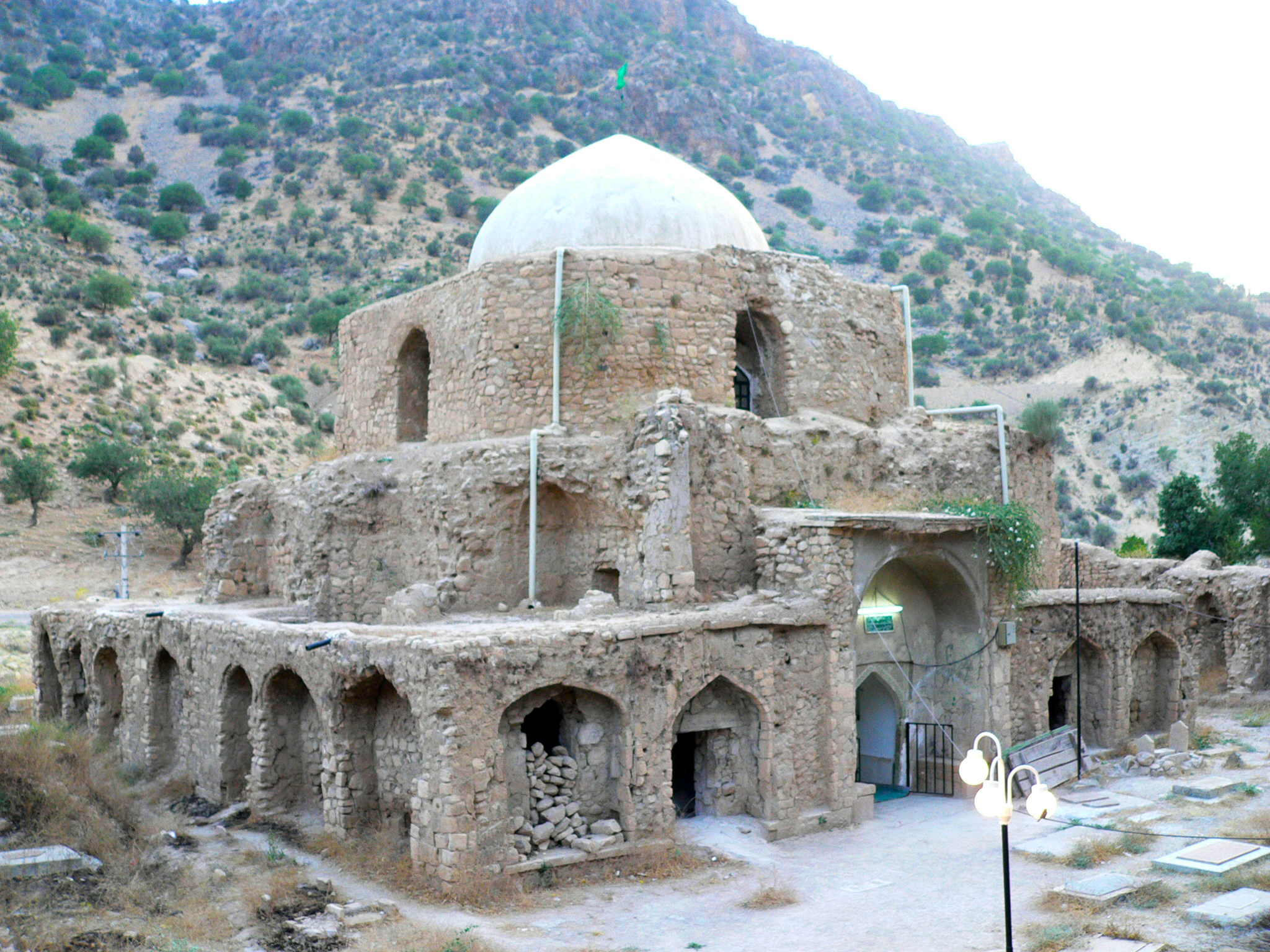 آرامگاه سید داود فهلوی